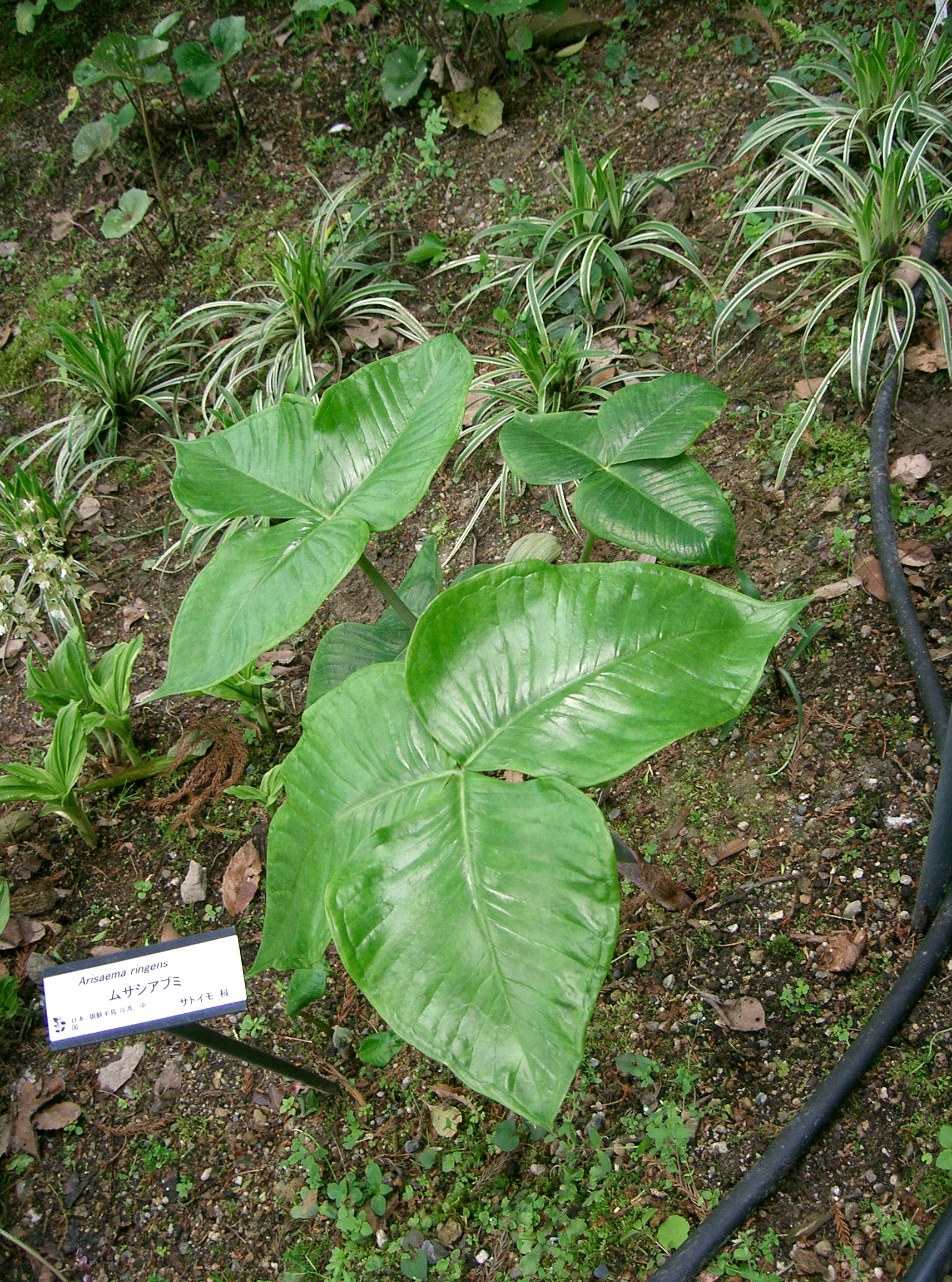 Scientific name Arisaema ringens